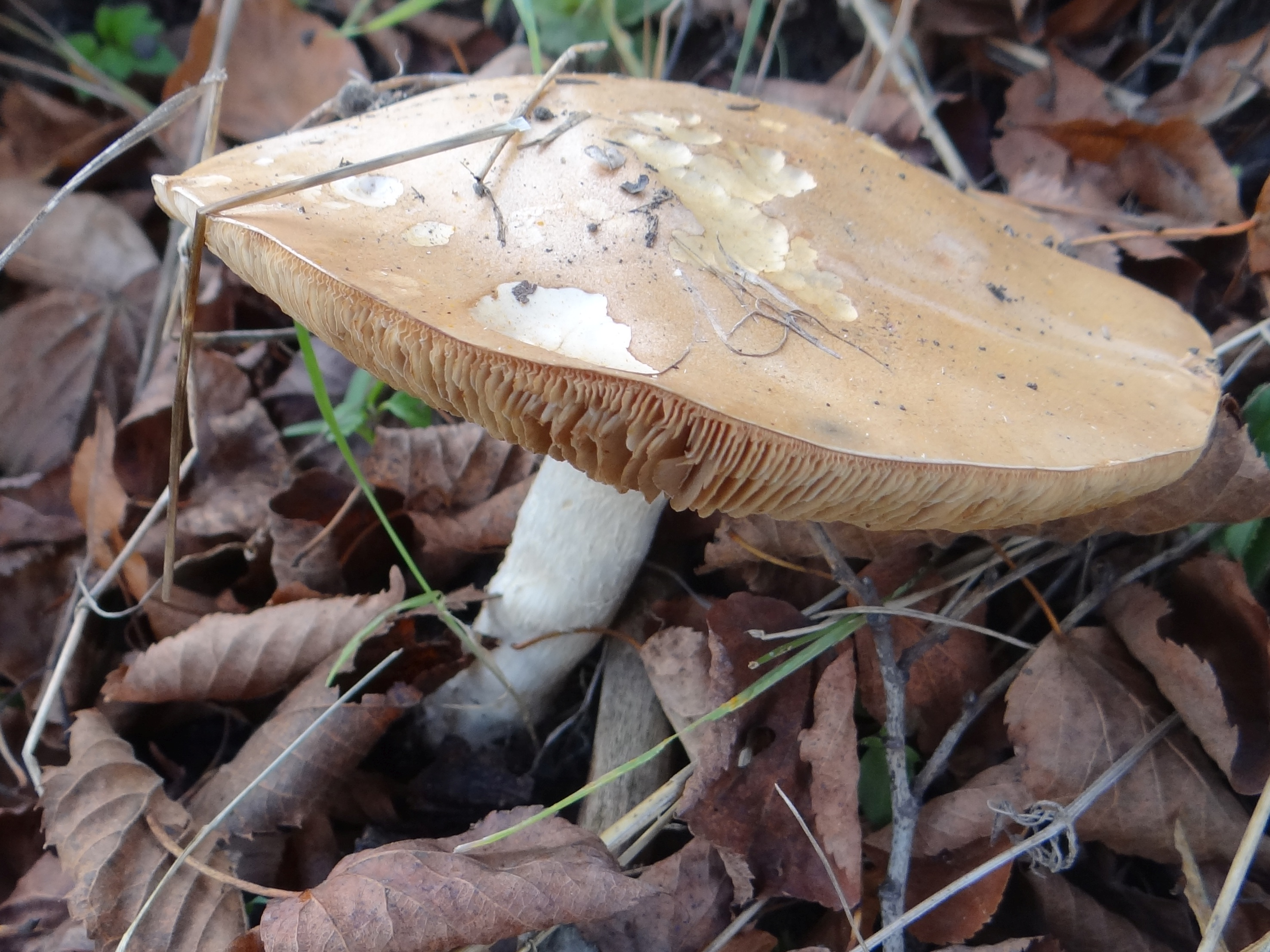 Hebeloma crustuliniforme (location: Poland, Beskid Orawsko-Podhalański, Żeleźnica)